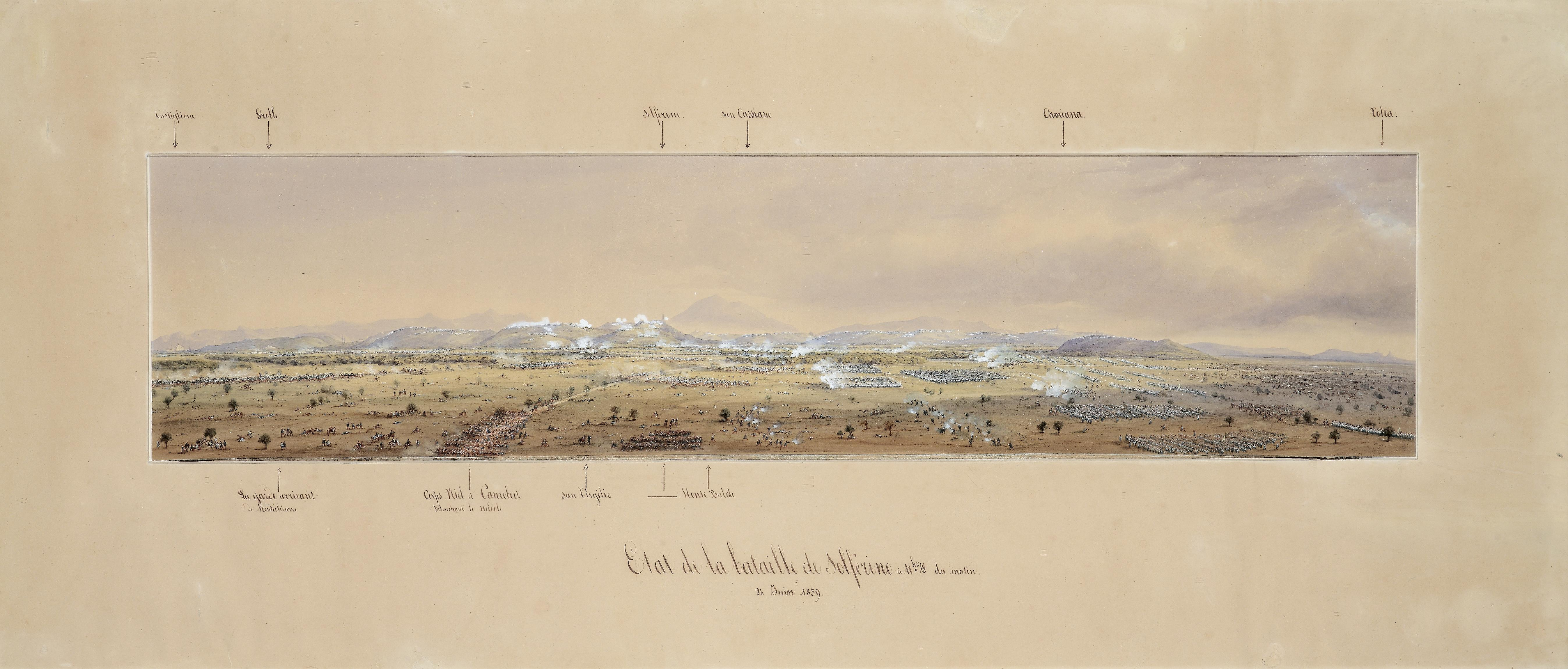 Panorama der Schlacht von Solferino mit Aufstellung der Truppen um 11 Uhr 30 am Vormittag, verso altes Etikett mit Beschriftung, "Carlo Bossoli" Legende " Etat de la bataille de Solferino à 11 1/2du matin" bzw. topographische Angabe, datiert 24. Juin 1859, Gouache auf Papier, 28 x 118 cm